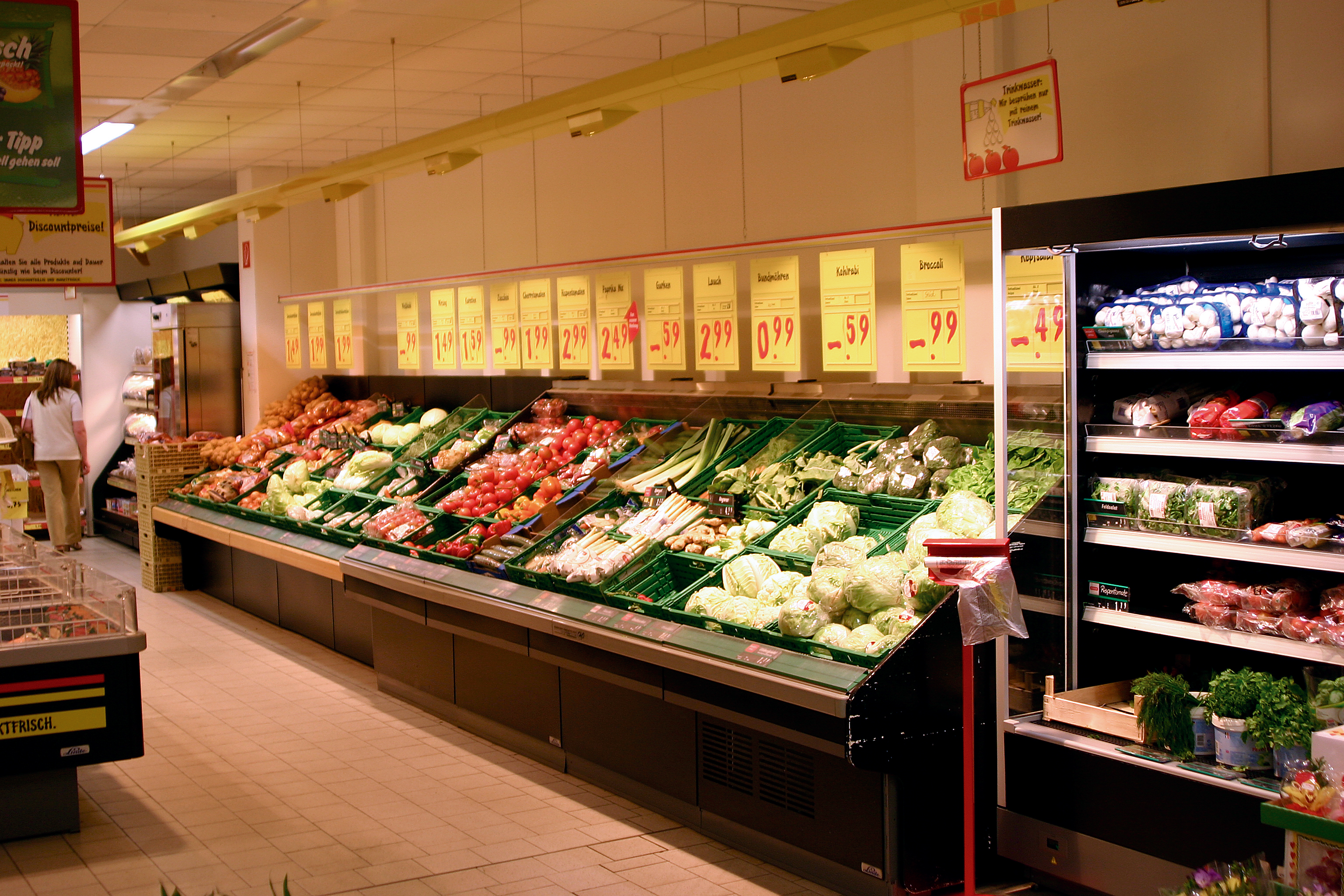 Gemüse im Supermarkt